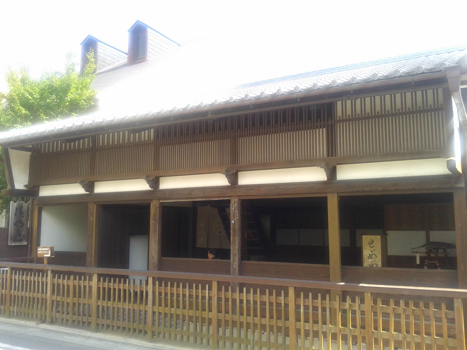 二川宿本陣資料館 旅籠屋『清明屋』 入口